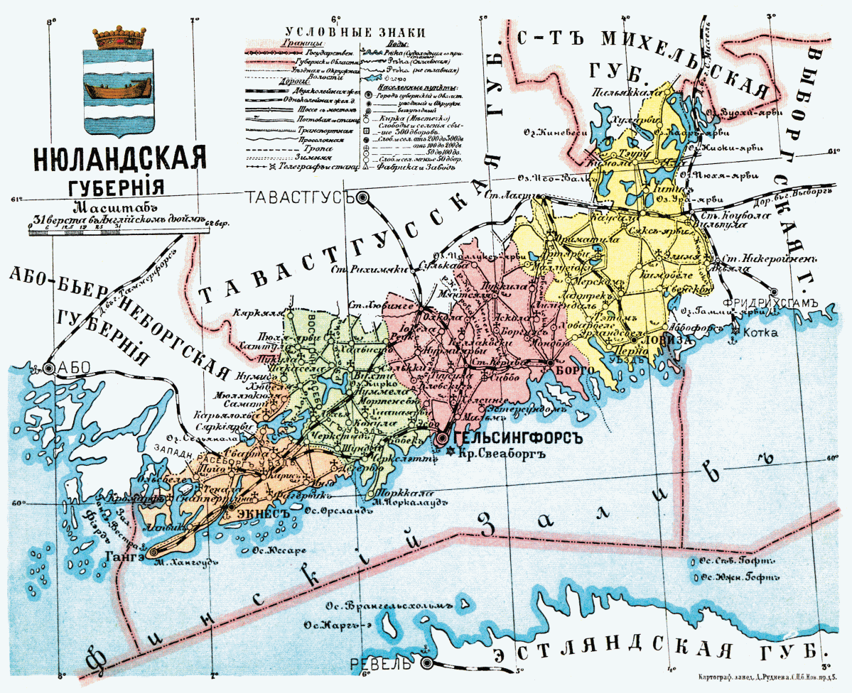 Карта Нюландской губернии Великого княжества Финляндского, 1913